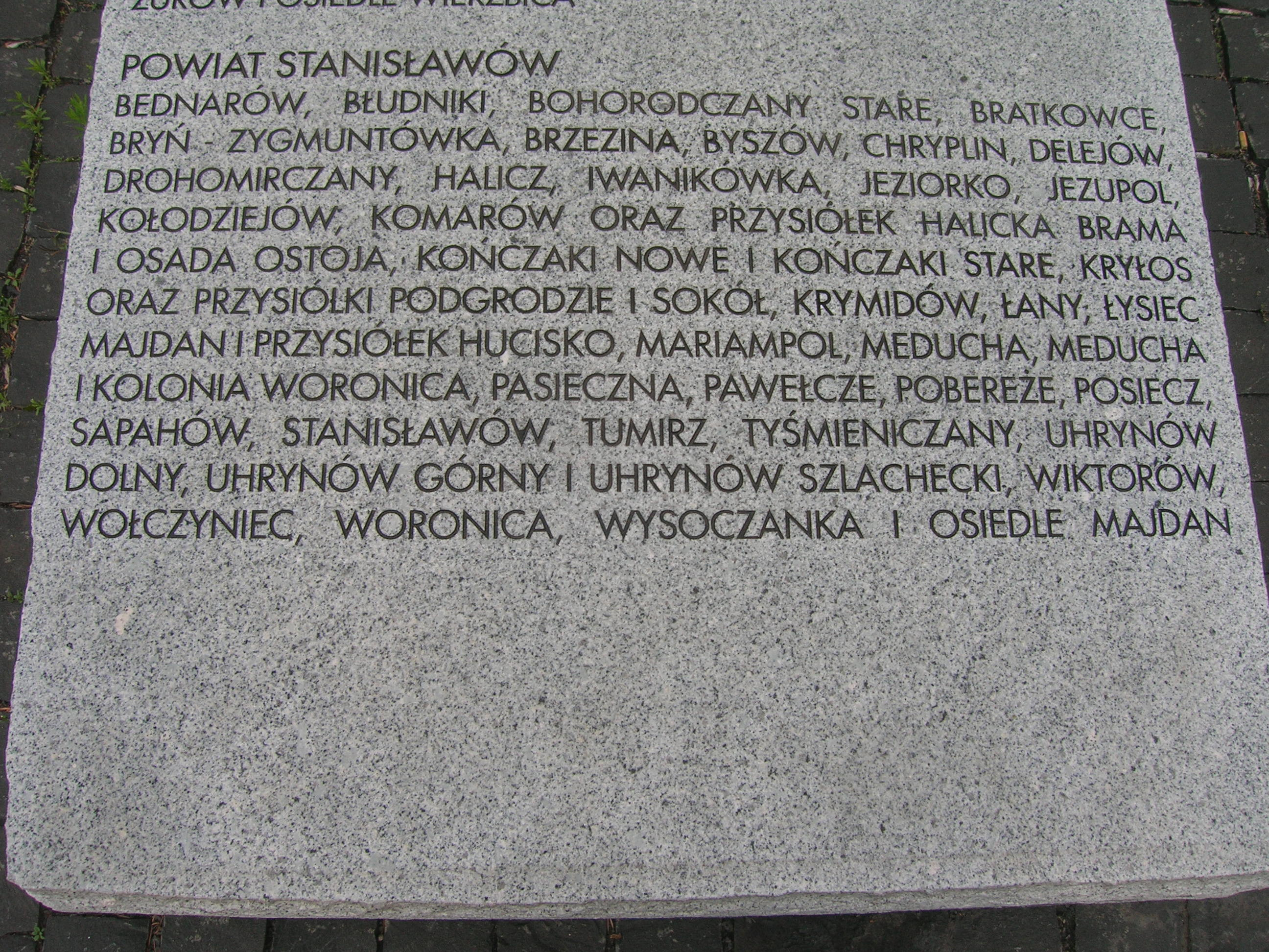 tablica powiat Stanisławów